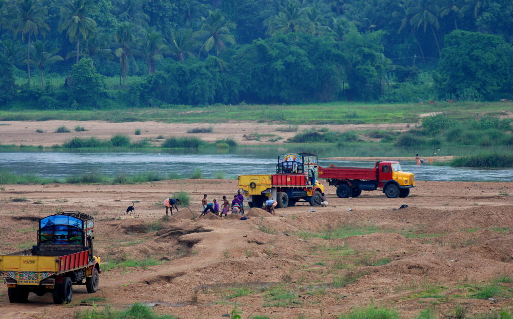 Trucks taking sand from Bharathapuzha, Palakkad